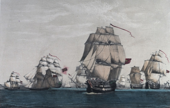 Deuxième bataille du cap Saint-Vincent (1780)